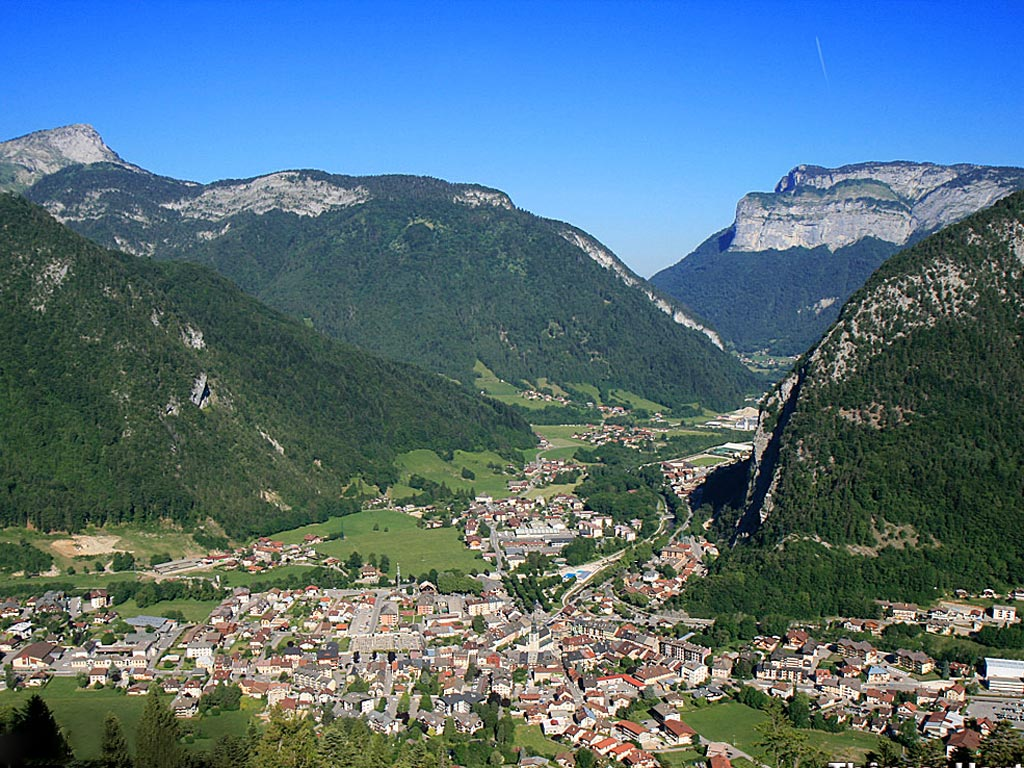 Thônes, la capitale du Reblochon et du Chevrotin. Haute-Savoie (France). Vue sur la Via Ferrata.